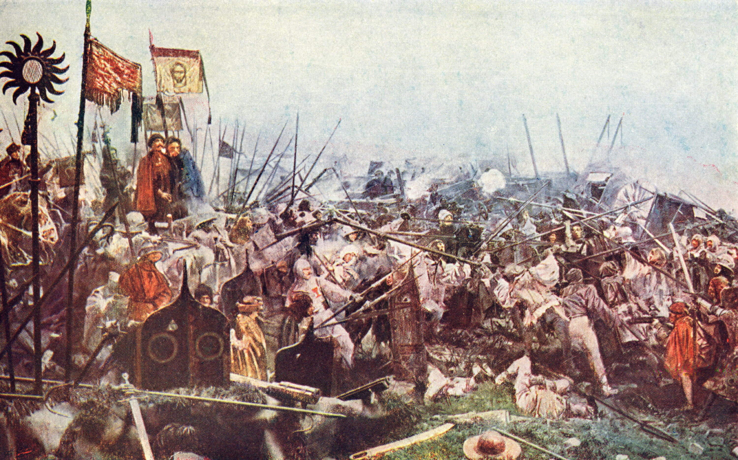 Bitva u Lipan: Skupina táborských a sirotčích vojevůdců. Zobrazeni zde jsou Prokop Holý, Prokop Malý, Jan Roháč z Dubé a ozbrojenci Jana z Bergova. Výjev z Maroldova panoramatu bitvy u Lipan, jež bylo pořízeno pro Výstavu architektury a inženýrství, která se konala na Výstavišti v Praze Holešovicích v roce 1898.